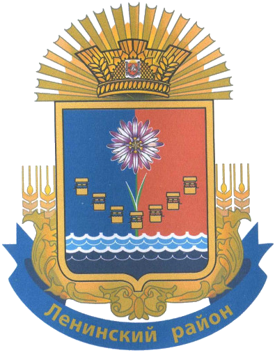 Герб муниципального образования «Ленинский район Республики Крым», Россия